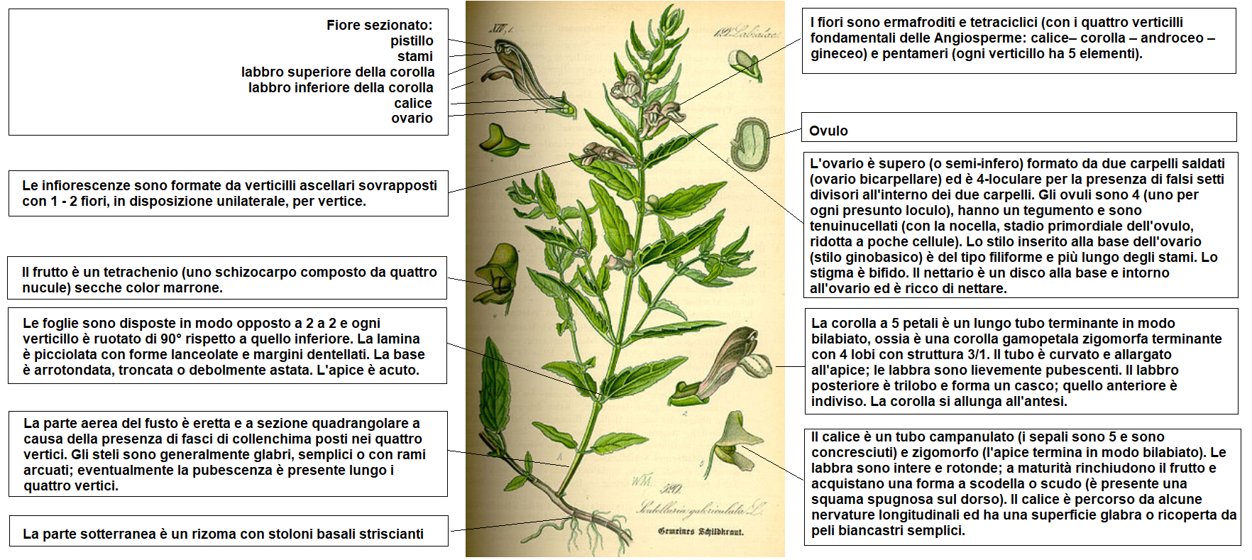 Illustration Scutellaria galericulata0.jpg